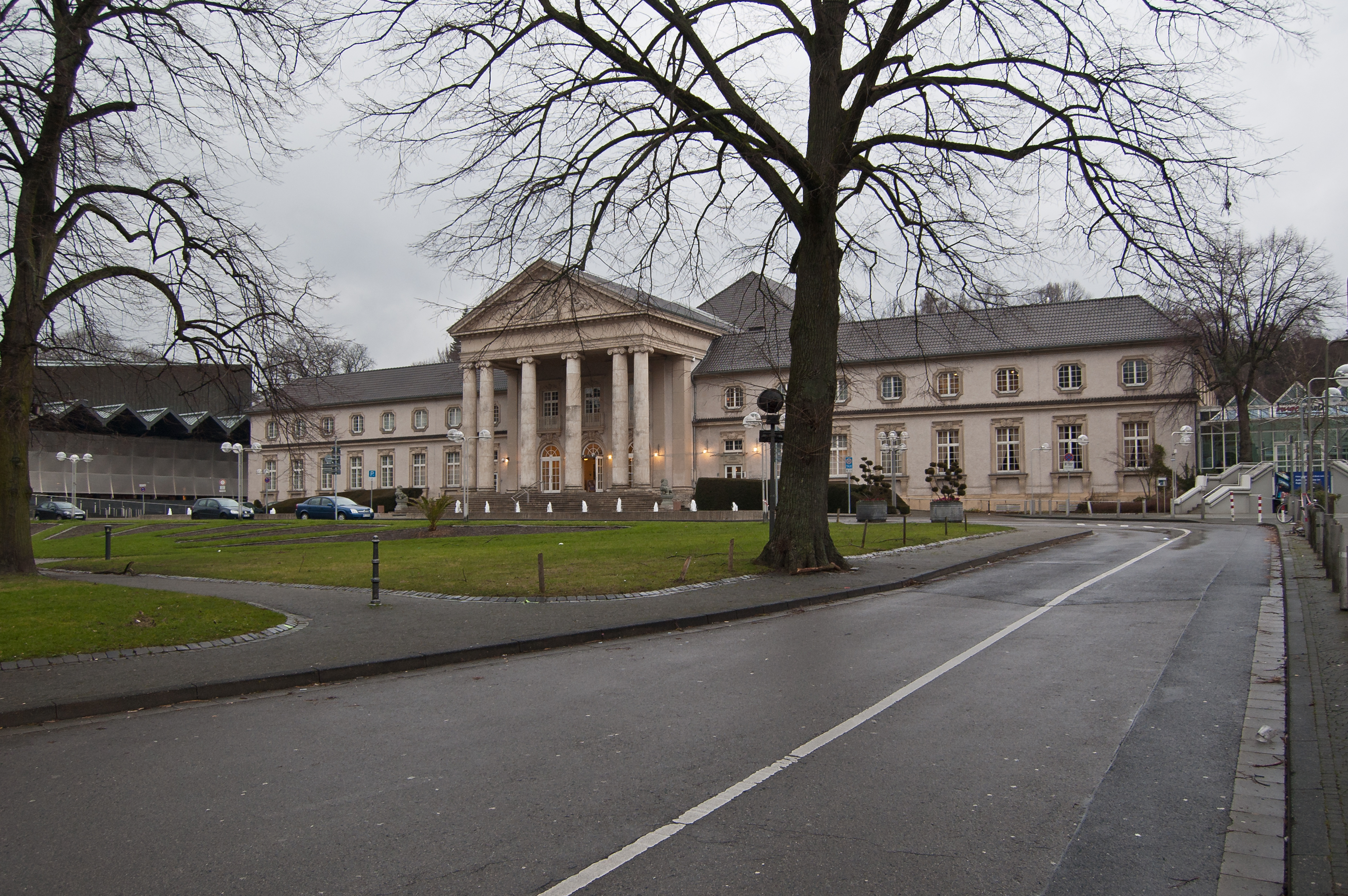 Das Neue Kurhaus in Aachen (heute Spielcasino) von der Zufahrt zur Monheimsallee aus gesehen. Links der im letzten Drittel des 20. Jahrhunderts errichtete Eurogressbau.